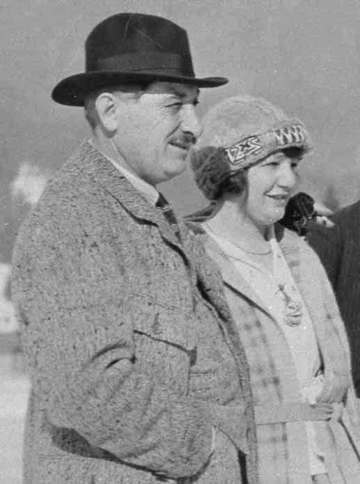 Carl Axel Pettersson, 1924 Olympics, med hustru Kerstin vid Olympiska spelen i Chamonix 1924